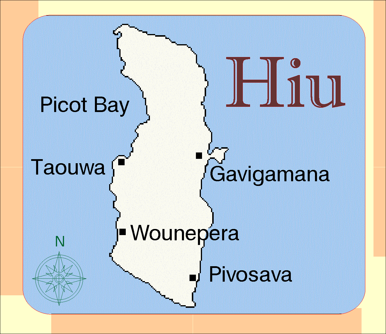 Карта на остров Хию.